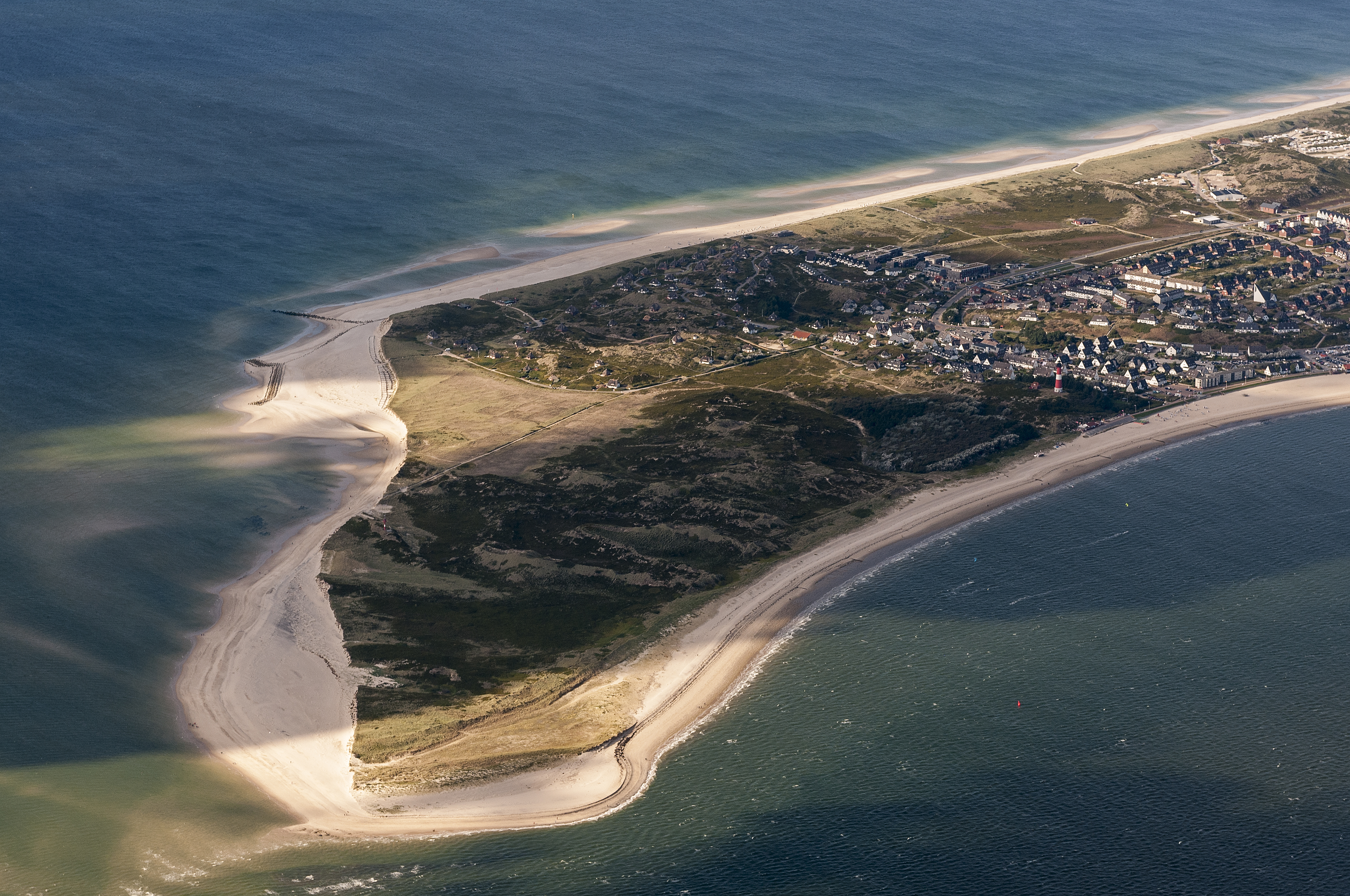 Fotoflug über das nordfriesische Wattenmeer, Blick aus S, 1 km Höhe auf die Hörnumer Odde